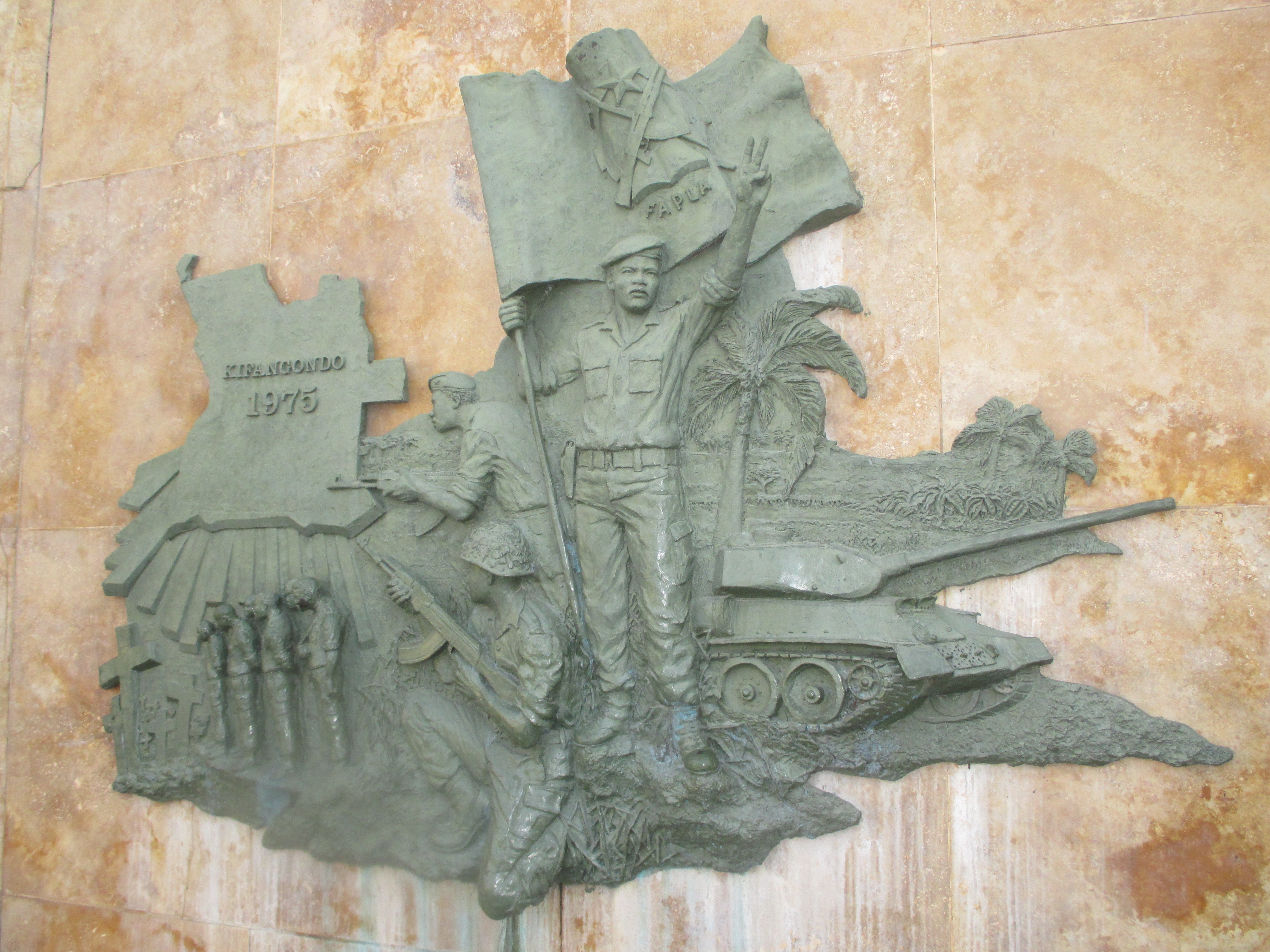 Esta obra é de autoria do museu nacional de história Marco historico do kifangondo fotografada por Abraão Fernando Figueira (talk) 01:02, 5 September 2015 (UTC) numa exposição escolar realizada pela escola Flor viva. Mostra os herois que lutaram para libertação Nacional de Angola. Para saber mais sobre o kifangondo visite o Portal de Angola em ou clique em aqui não se encontra o ficheiro mas sim onde fica situado o museu de onde foram feitas as fotografias.